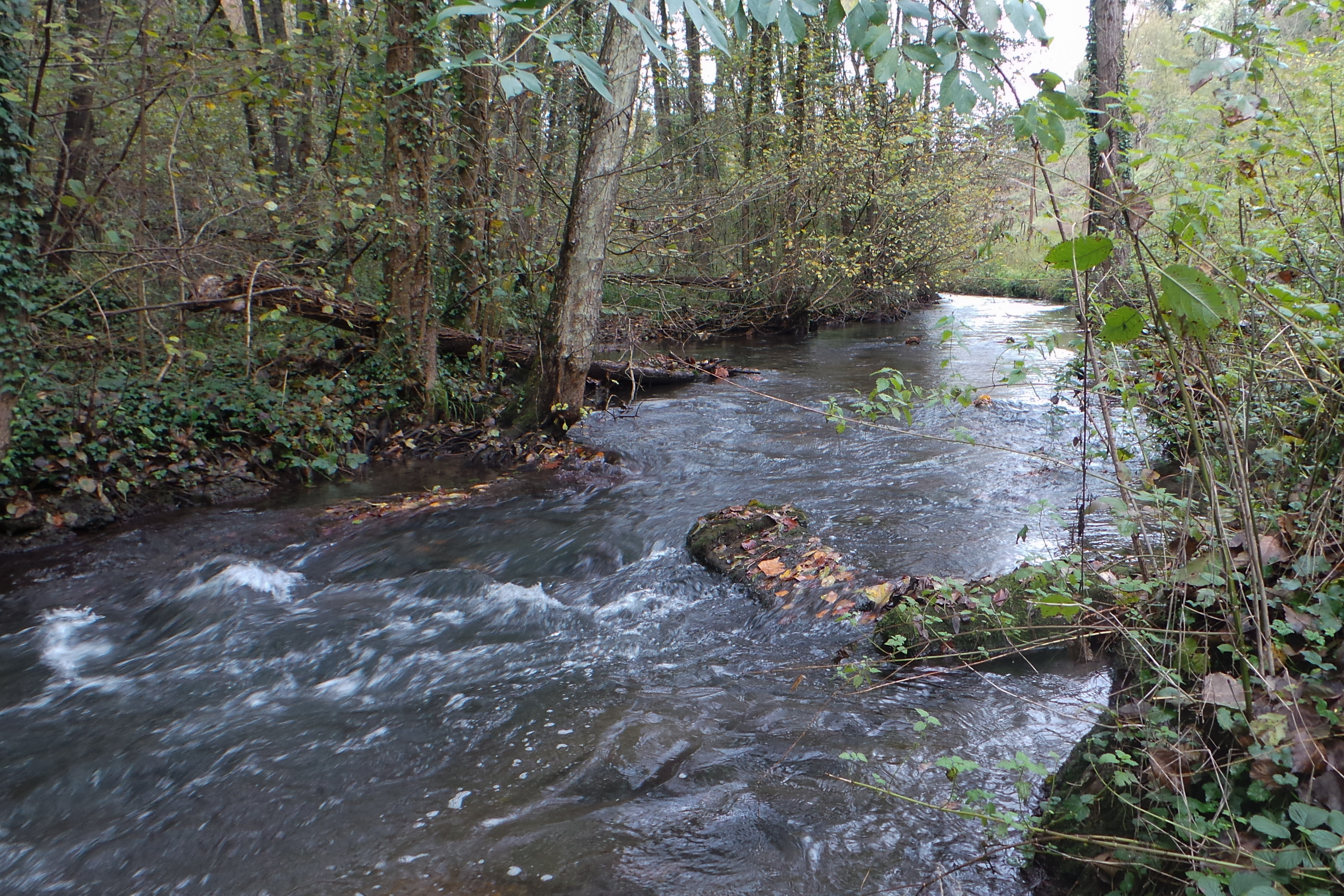 La Fure à Rives, au niveau du lieu-dit "Pont-du-Bœuf" (Rives / Isère / France)